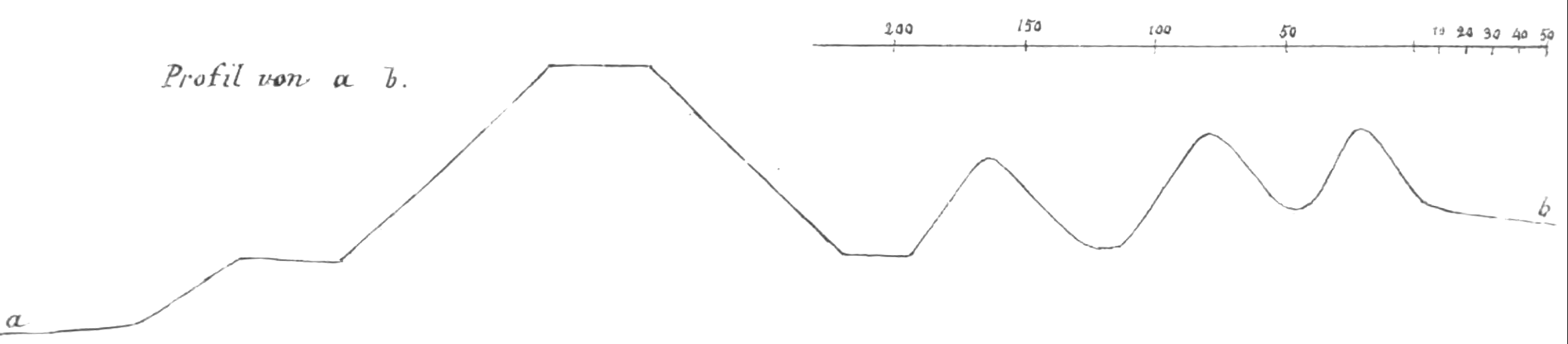 Schnitt a bis b der Teufelsburg im Rütiwald, Gemeinde Rüti bei Büren (Kanton Bern, Schweiz). Mottenburg mit Erdwällen und Gräben des 10./11. Jahrhunderts. Bearbeitung: Ausschnitt; um 50% verkleinert. Massstab: Fuss (nicht-metrisch).